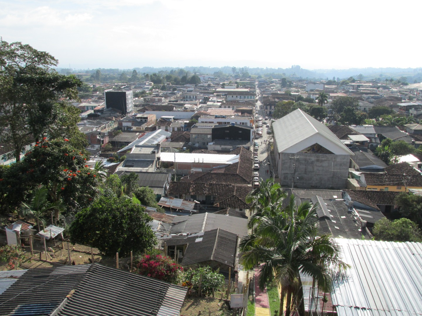 Panorámica aérea de Circasia, Quindío.